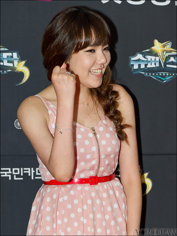 이보람. 슈퍼스타K 3 하이라이트 시사회 레드카펫 행사장에서